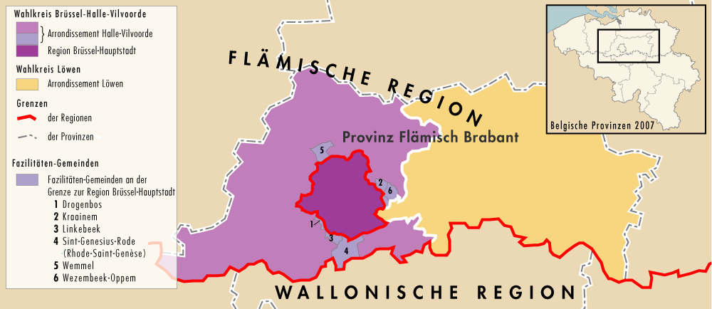 Die belgischen Wahlkreise Brüssel-Halle-Vilvoorde und Löwen 2007